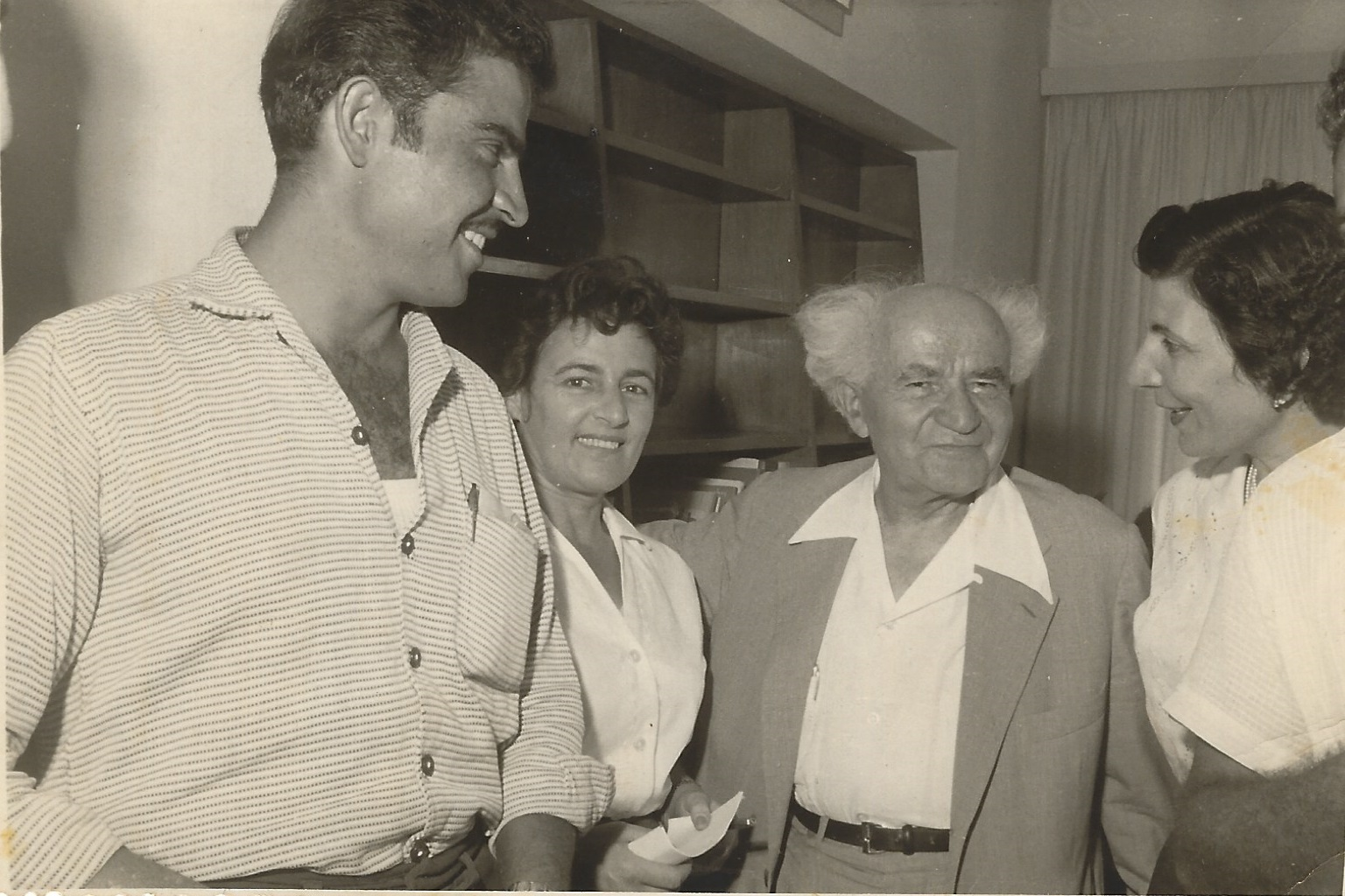 לילי מנחם בחברת בן-גוריון כשביקר במחוז תל-אביב